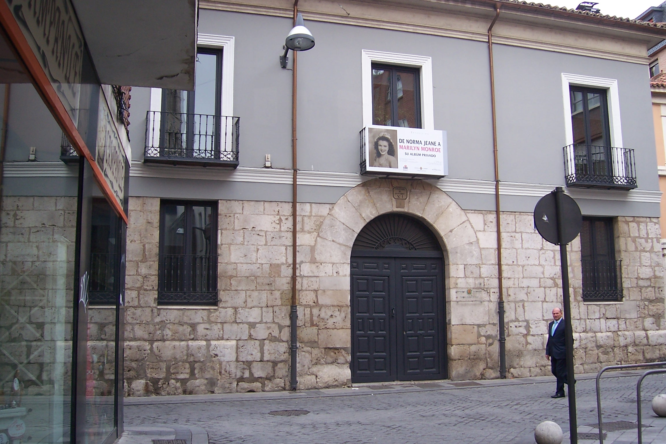 Casa Revilla en la calle de Torrecilla, Valladolid, España.